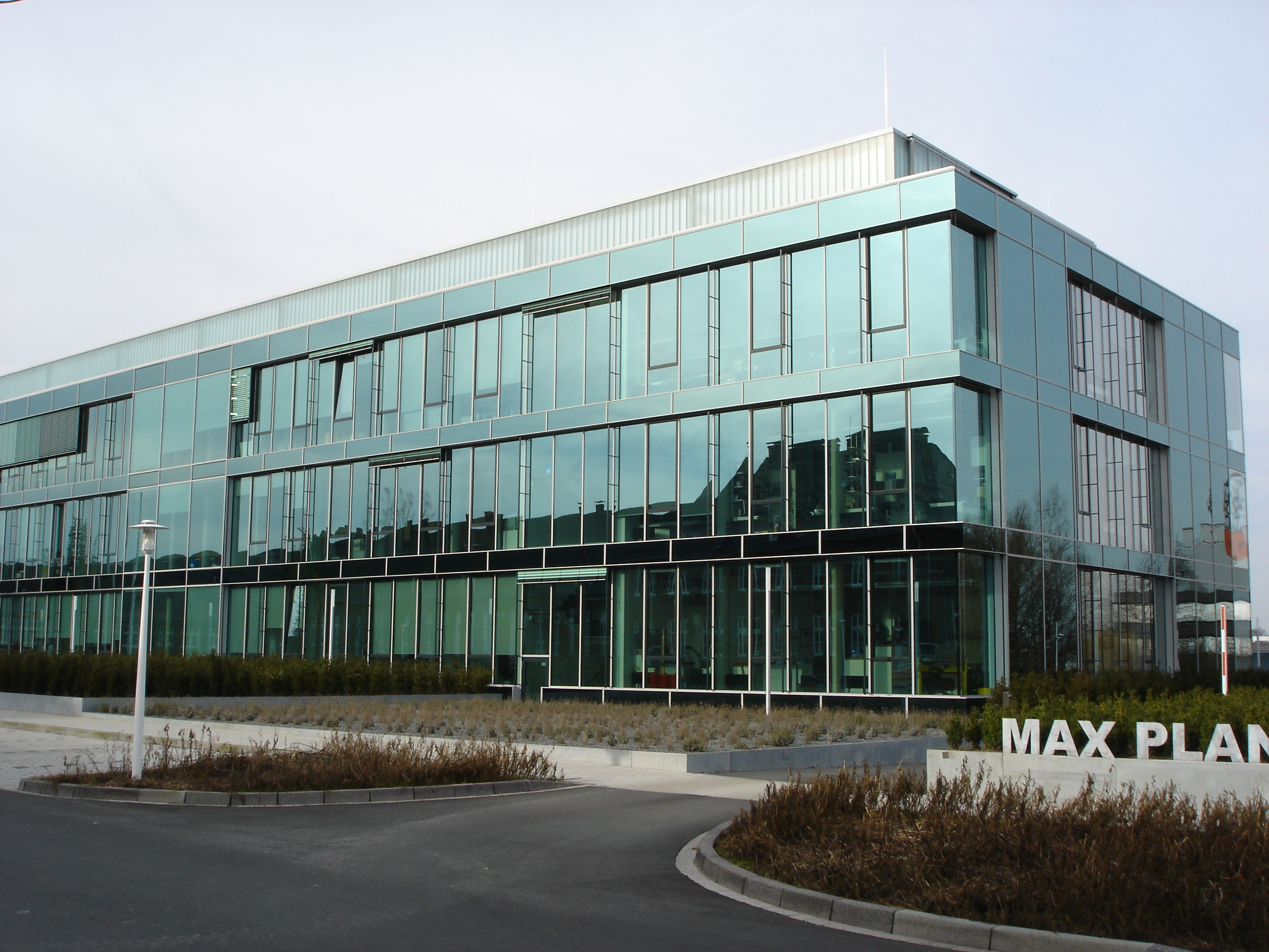 Max-Planck-Institut für molekulare Biomedizin, Münster, Germany